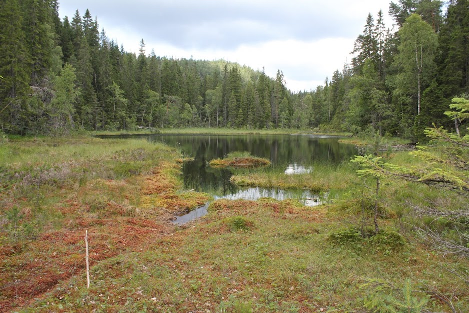 Nedre Bjørntjern, også kalt Småtjern